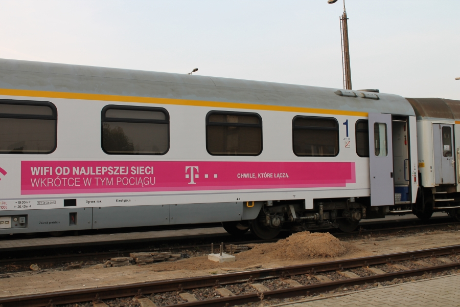 Wagon typu Z2A na terenie stacji postojowej Warszawa Grochów.